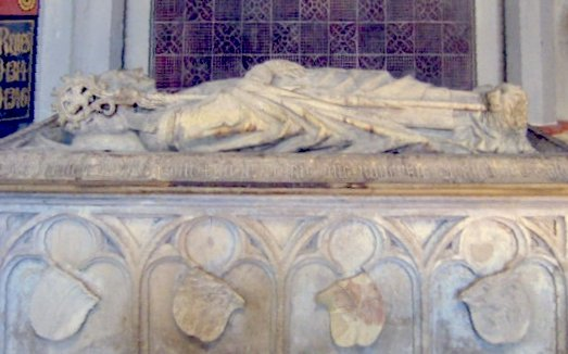 Bonner Münster – Grabmal des Erzbischofs Ruprecht von der Pfalz